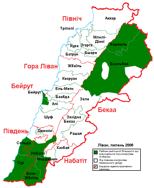 Карта Лівану з поміченими зонами контролю Хізбалли станом на липень 2006